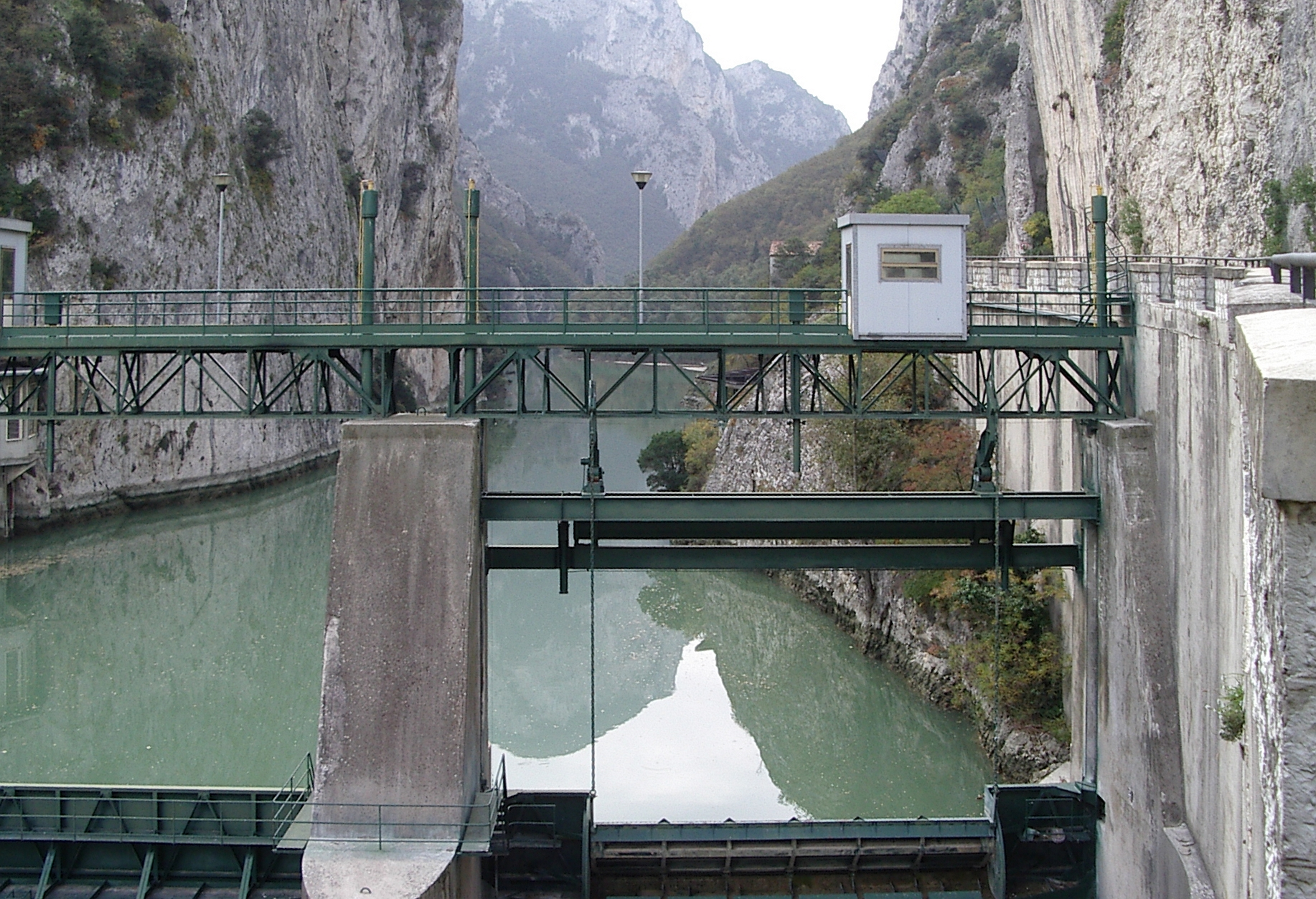 Barrage hydroéléctrique à la Gola del Furlo Province de Pesaro Urbino Italie